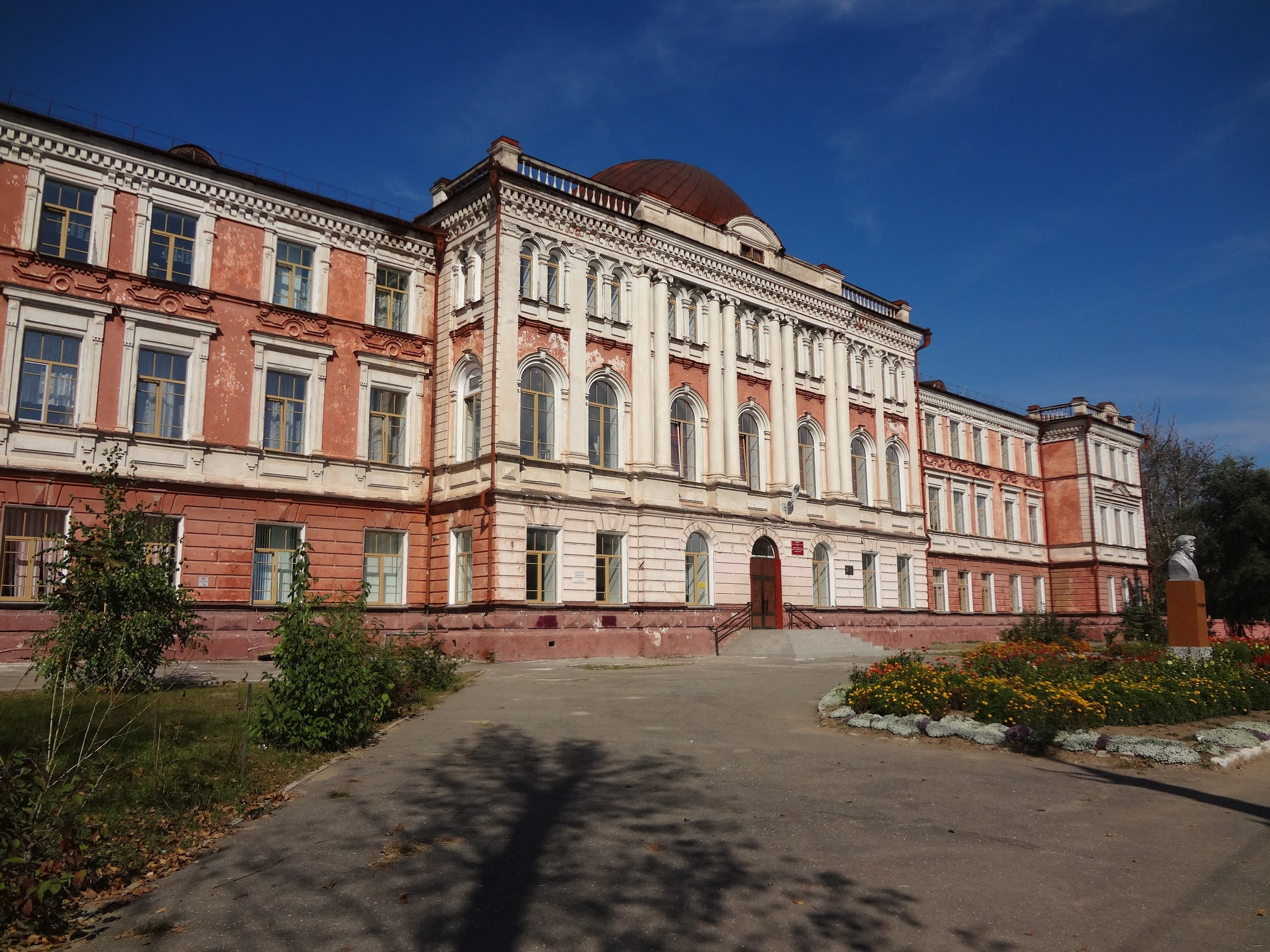 (Амурская область, Благовещенск, горького улица, 153)